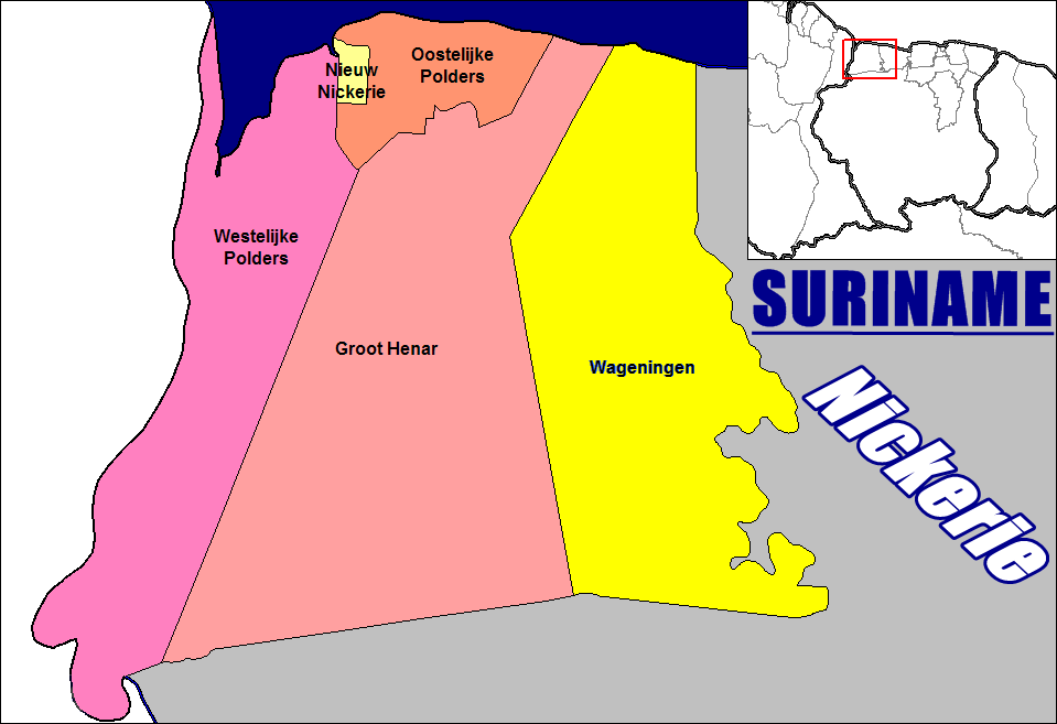 Nickerie_Suriname_América do Sul.